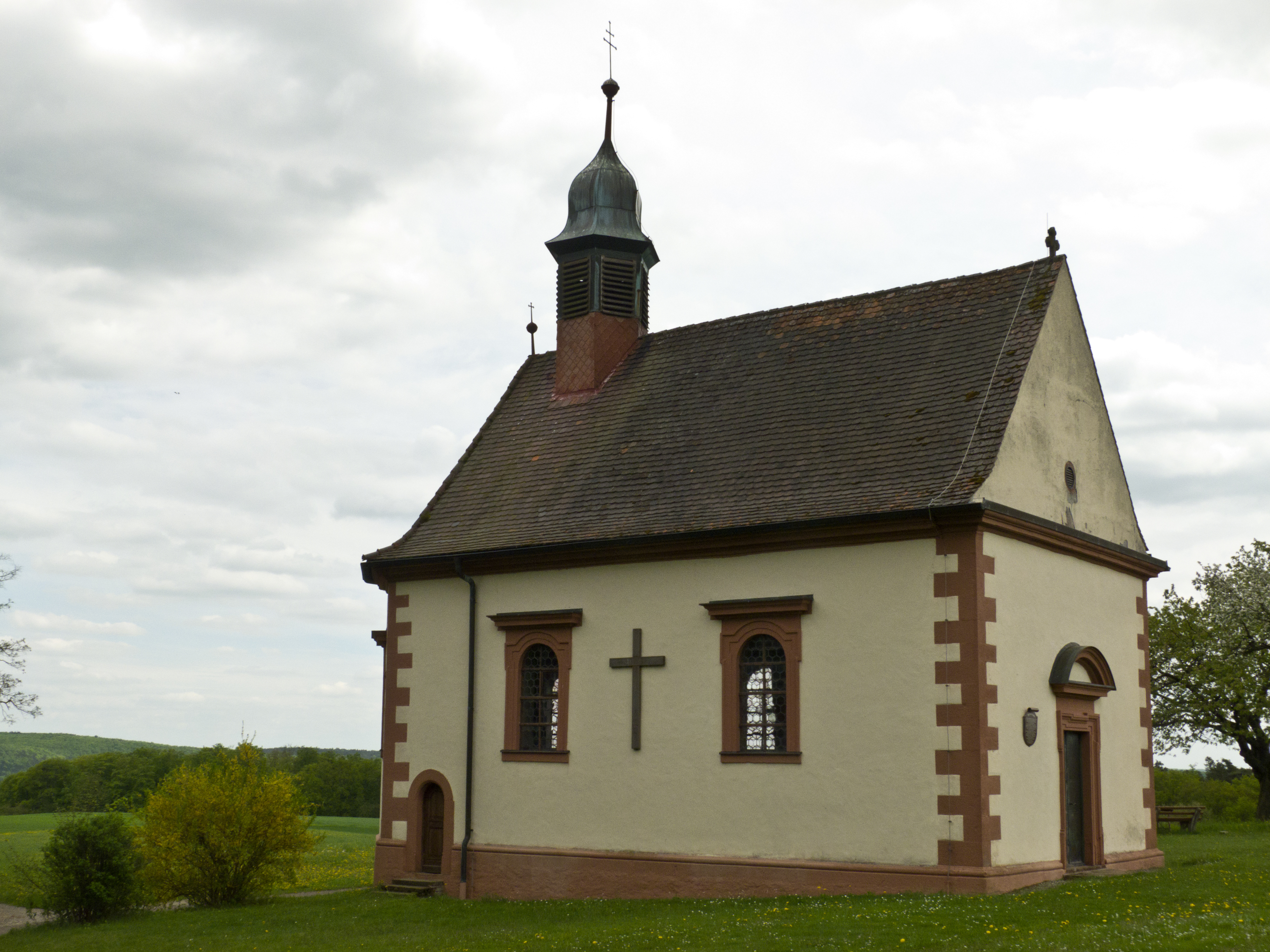 Michaelskapelle Frankenbrunn, NW-Sicht